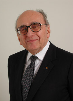 Politico italiano